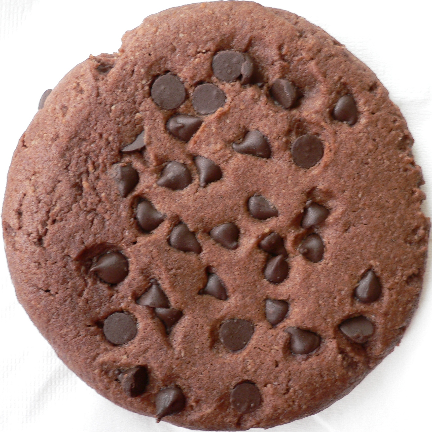 Una galleta de chocolate con trozos de chocolate.